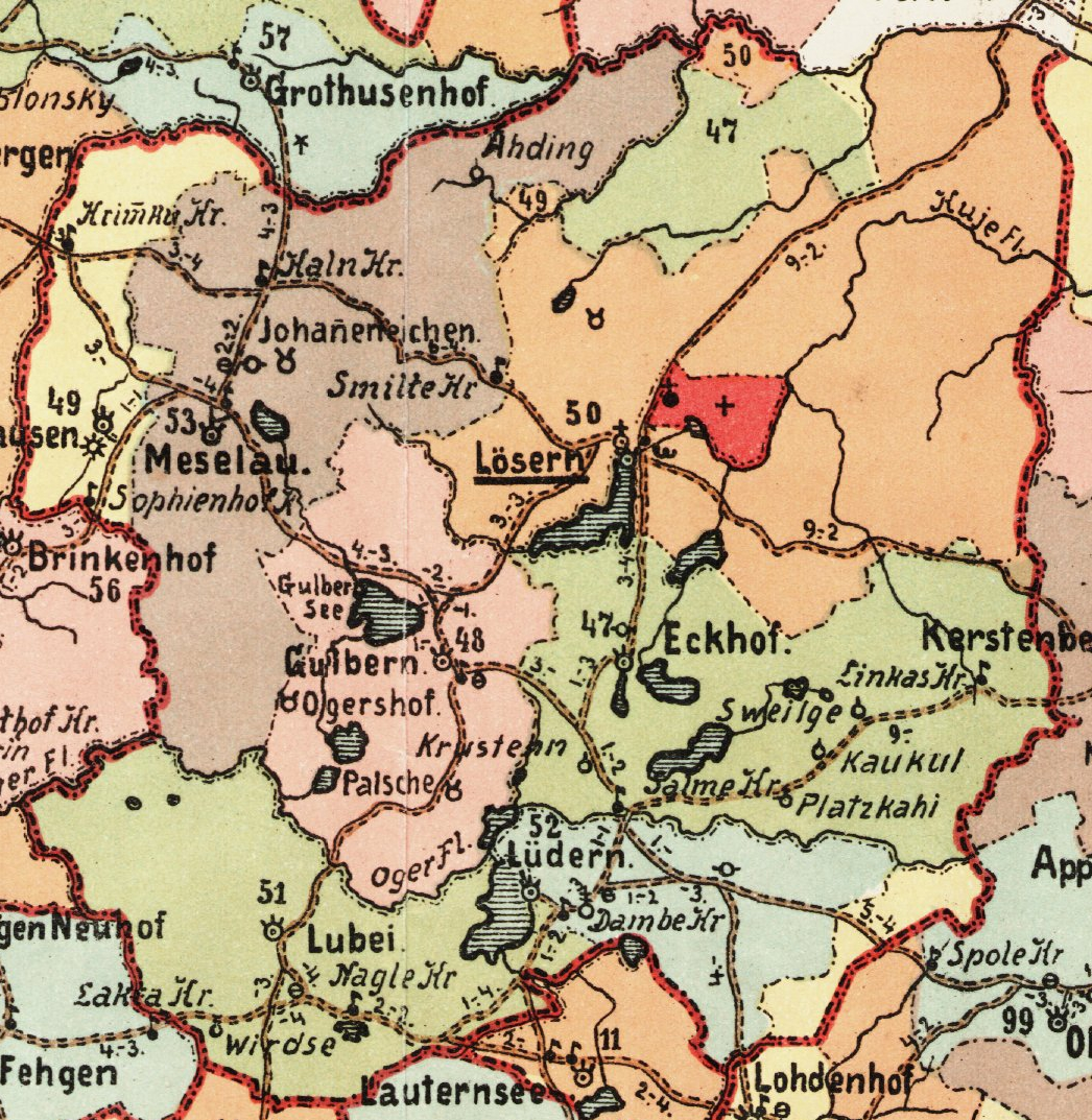 Liezēre kihelkonna mõisad 1903. aasta kaardil.